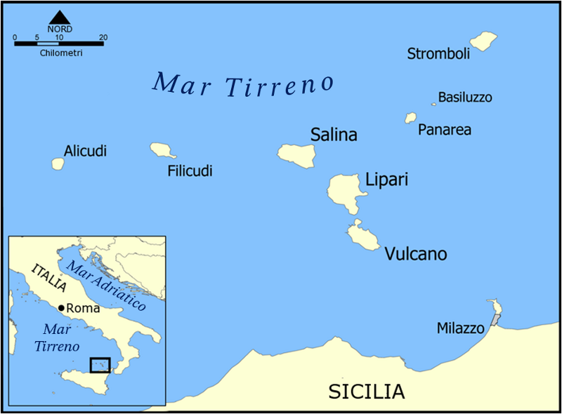 tradotto dalla versione inglese